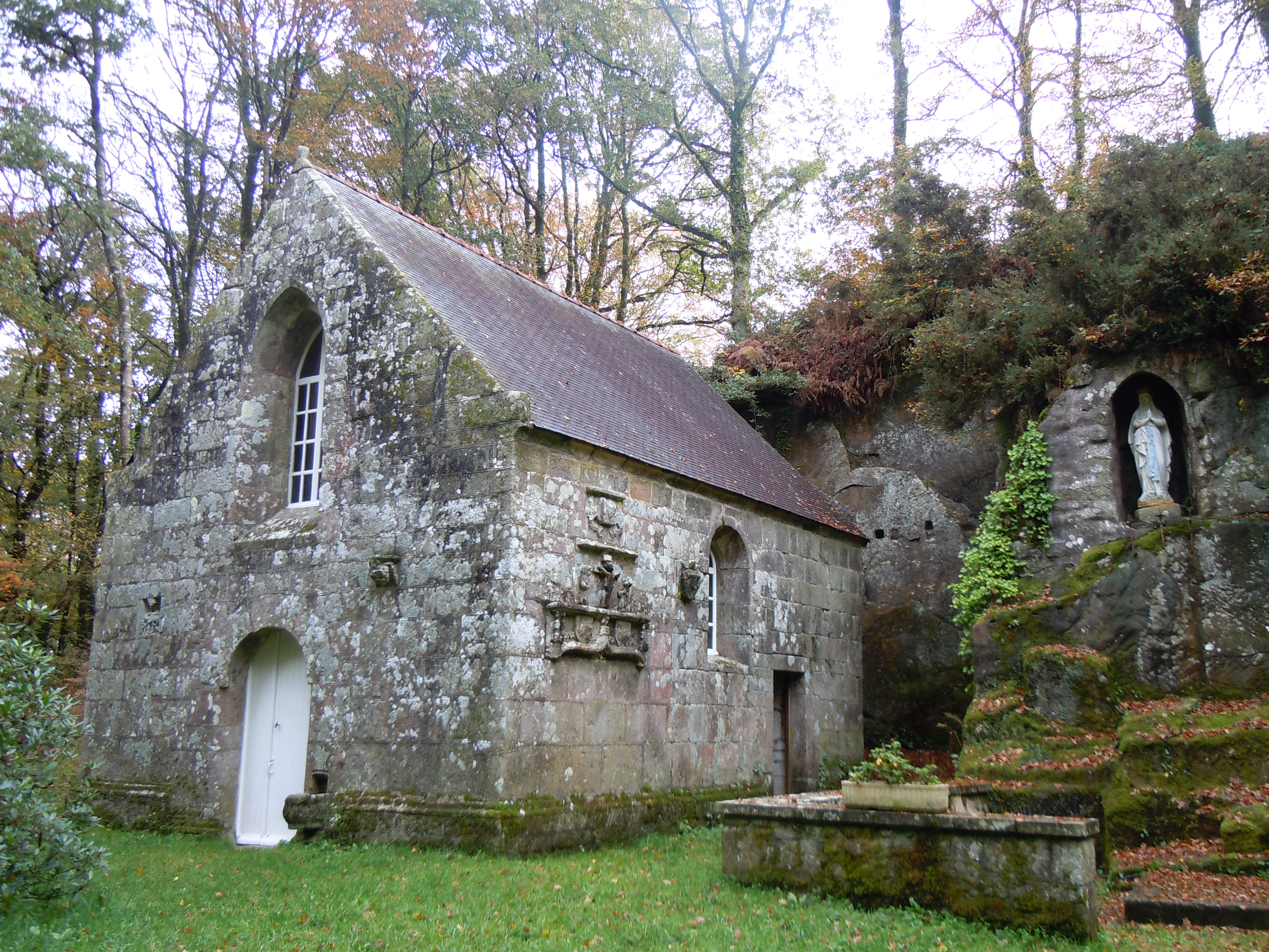 vue générale de la chapelle Notre-Dame-de-la-Fosse, commune de Ploërdut, département du Morbihan,France